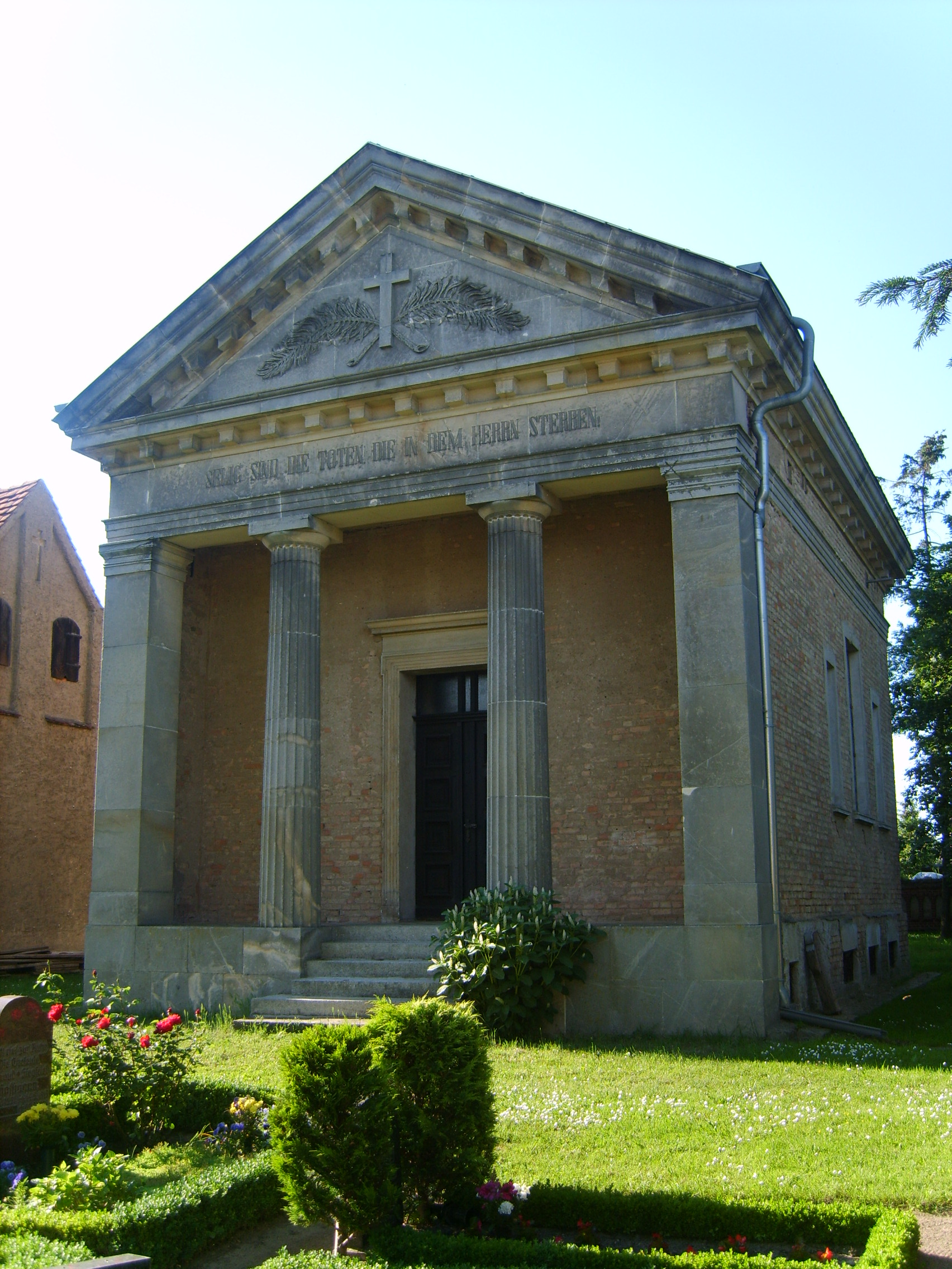 Mausoleum der adeligen Familie von Borcke in Auerose, Mecklenburg-Vorpommern